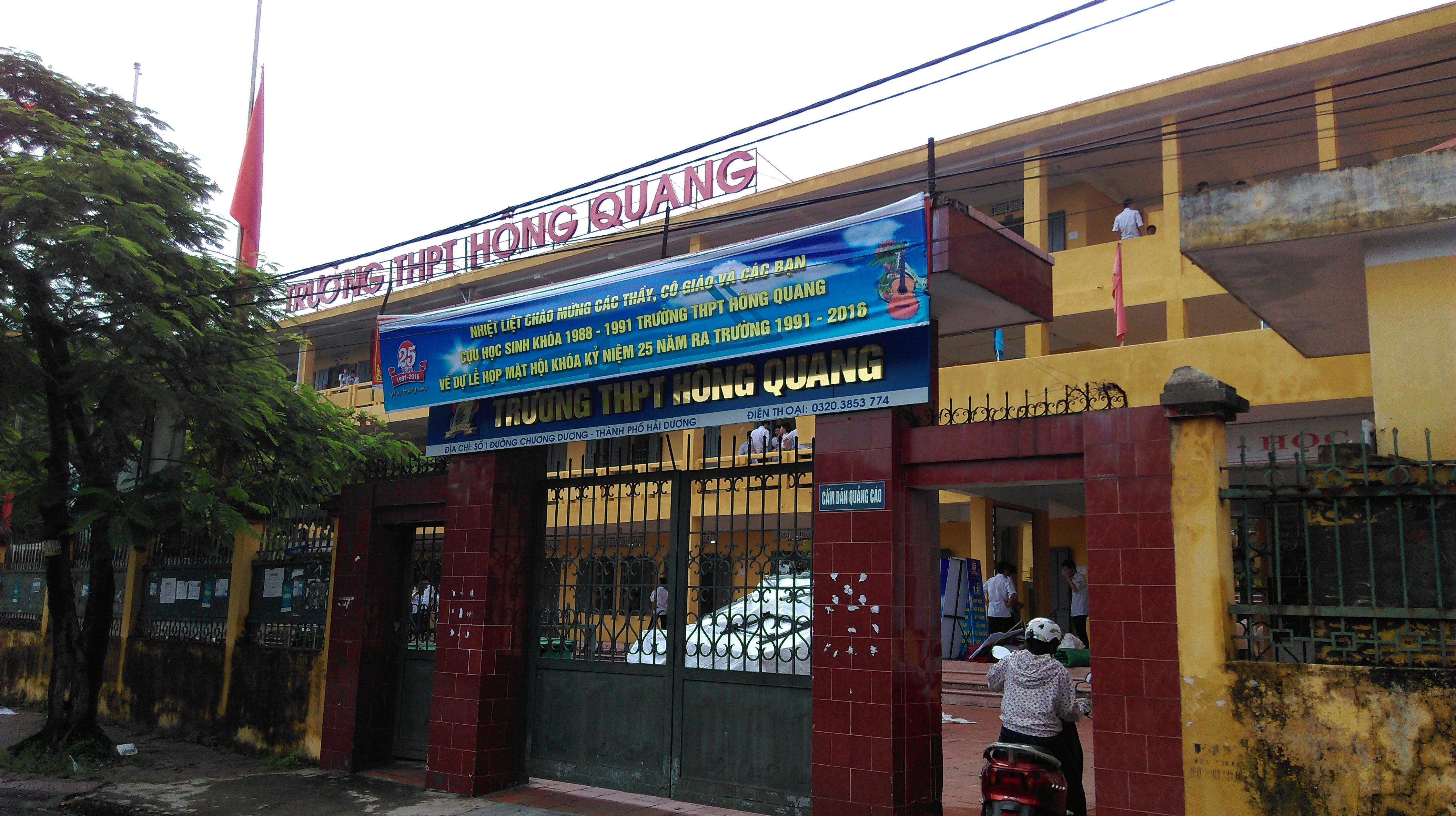 Trường THPT Hồng Quang, Hải Dương